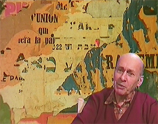 Portrait de Jacques Villeglé